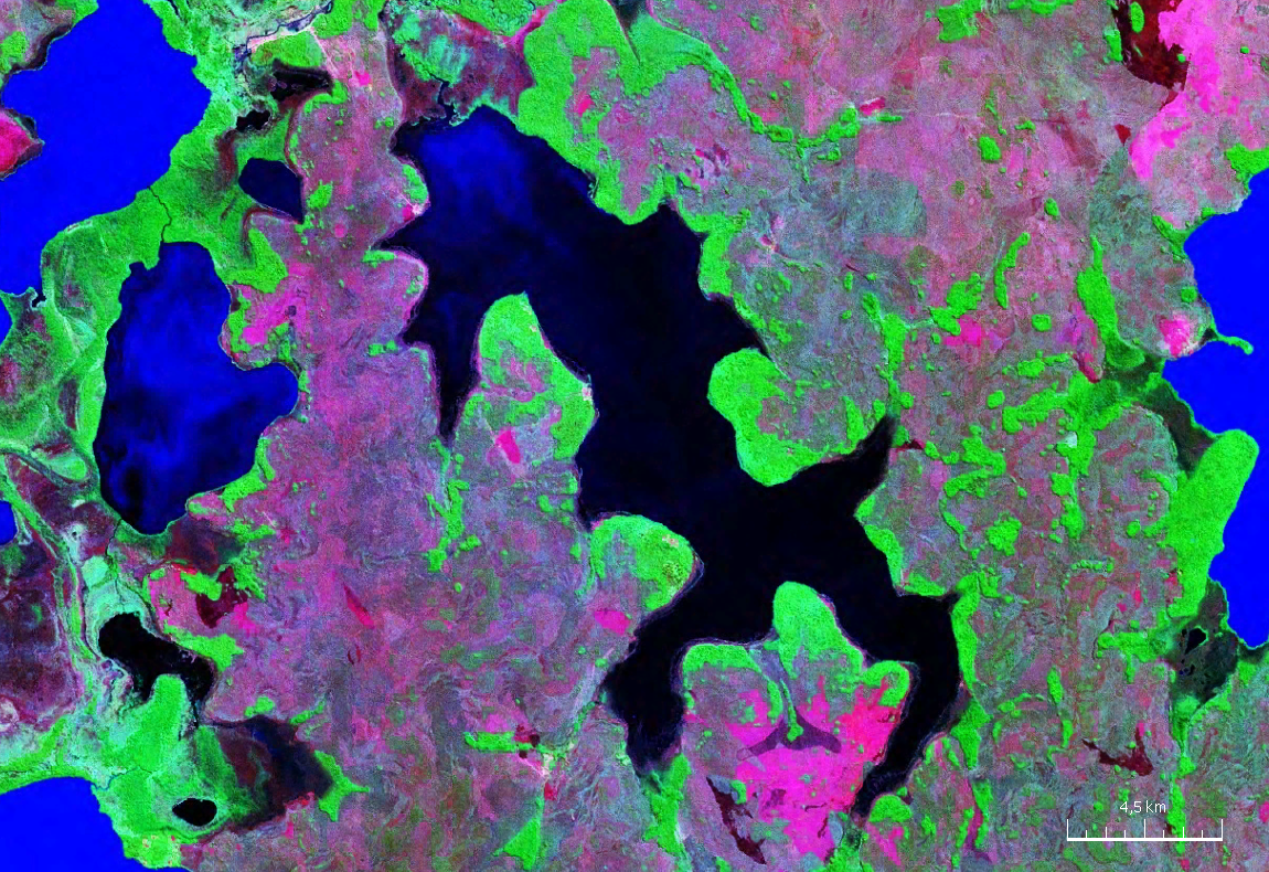 Vista satelital de la laguna Larga ubicada en el departamento del Beni (Bolivia).